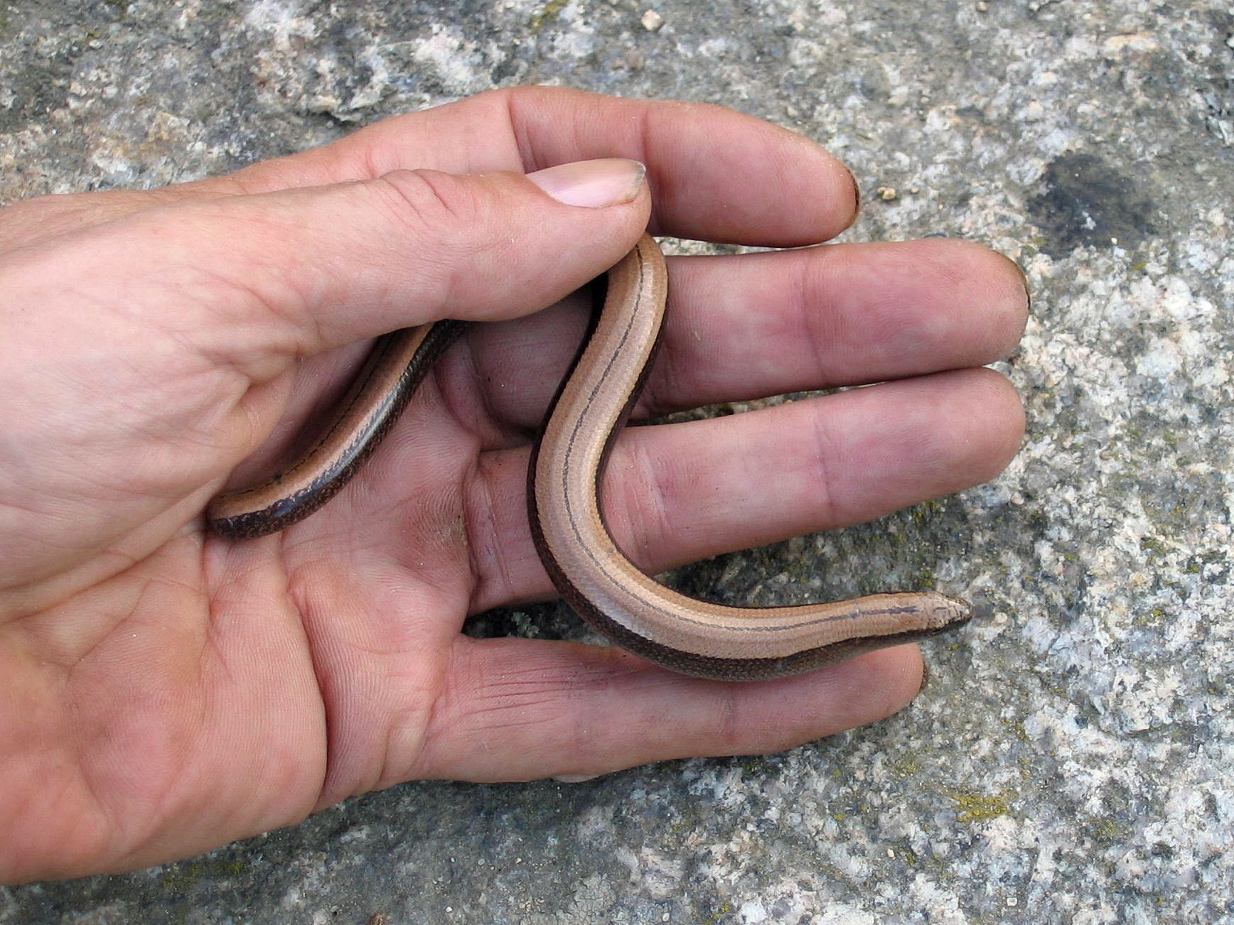 Exemplar xuvenil de escáncer común (Anguis fragilis) no Grove